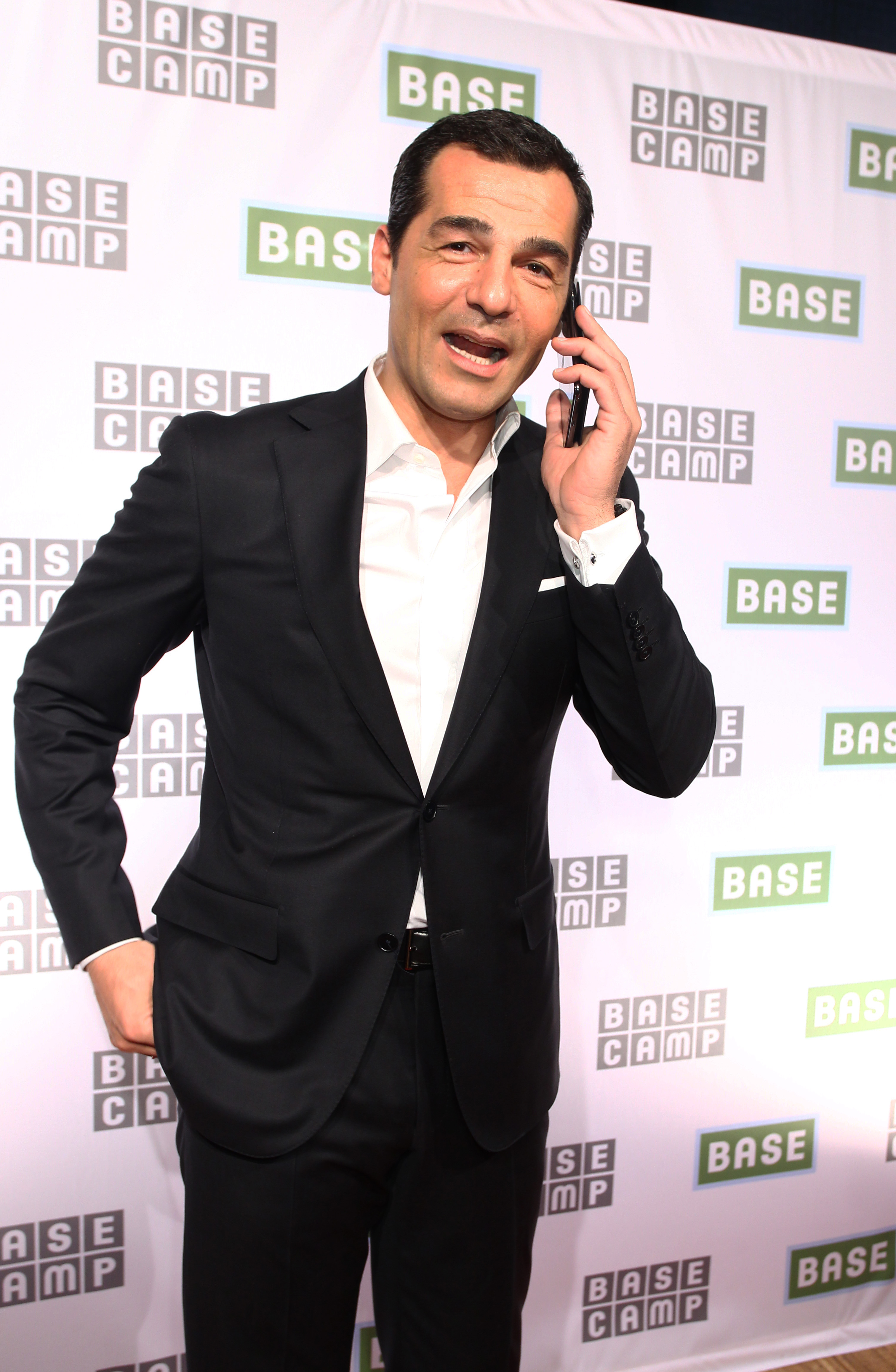 Schauspieler Erol Sander in Berlin